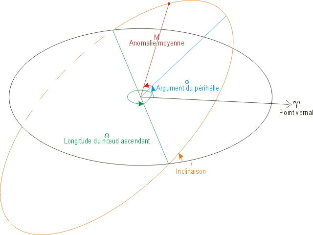 Éléments orbitaux illustrés Le dessin est de moi et est derechef mis dans le domaine public.